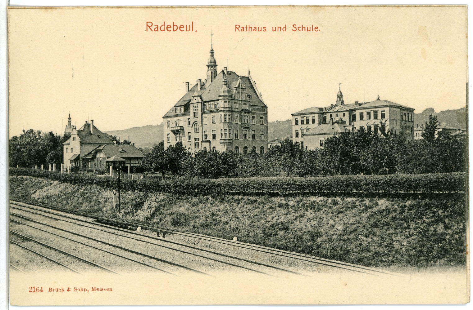 Radebeul; Rathaus und Schule This postcard is from publisher Brück & Sohn in Meißen ( postcard has a unique number 02164 and is available in a higher resolution at the publisher. This images was uploaded in a cooperation project between Wikipedians and the publisher.